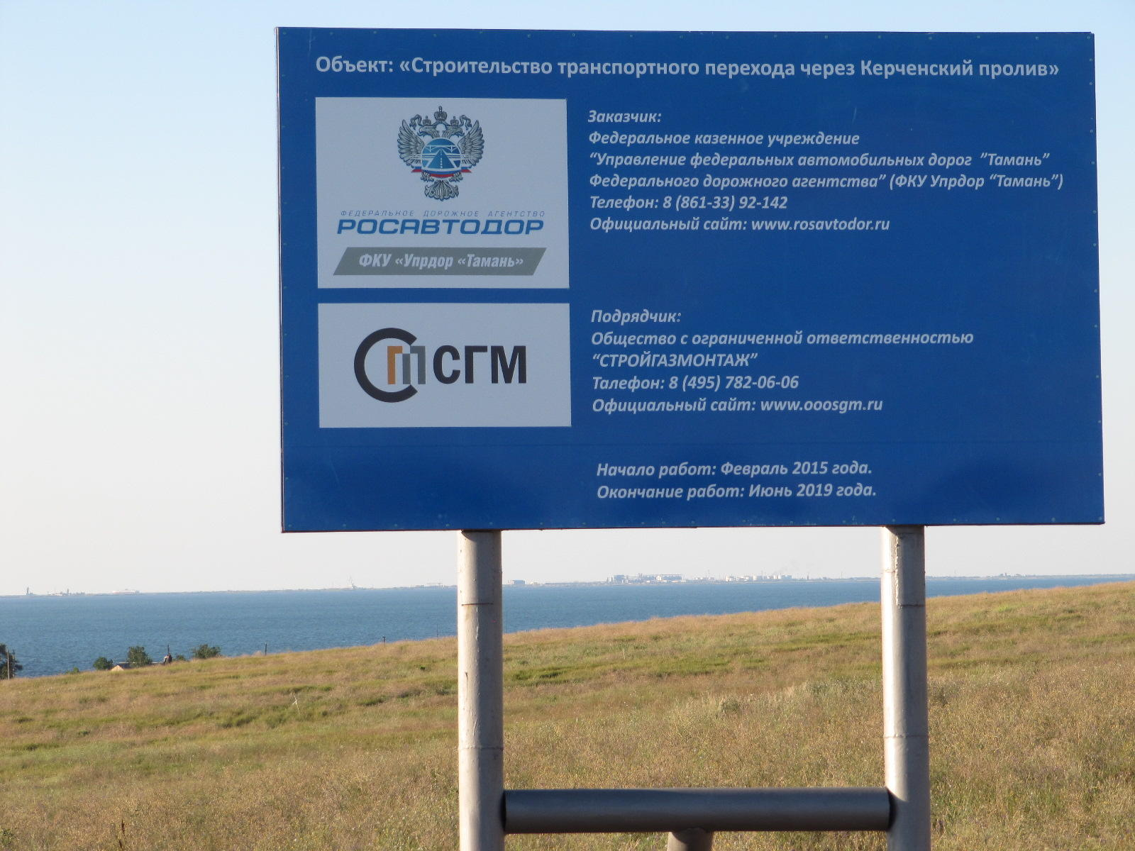 Объект "Строительство транспортного перехода через Керченский пролив"